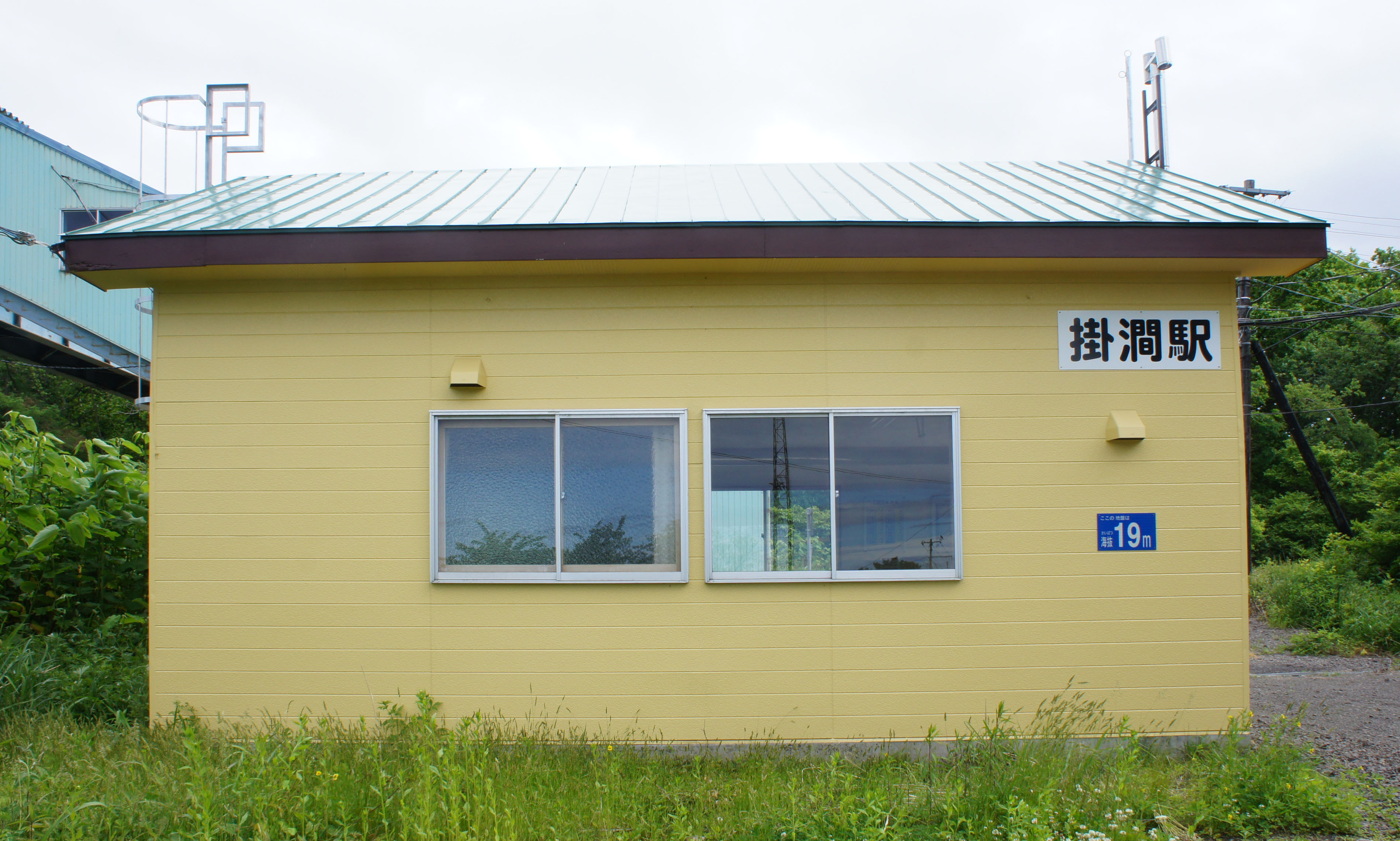 JR函館本線・掛澗駅の駅舎